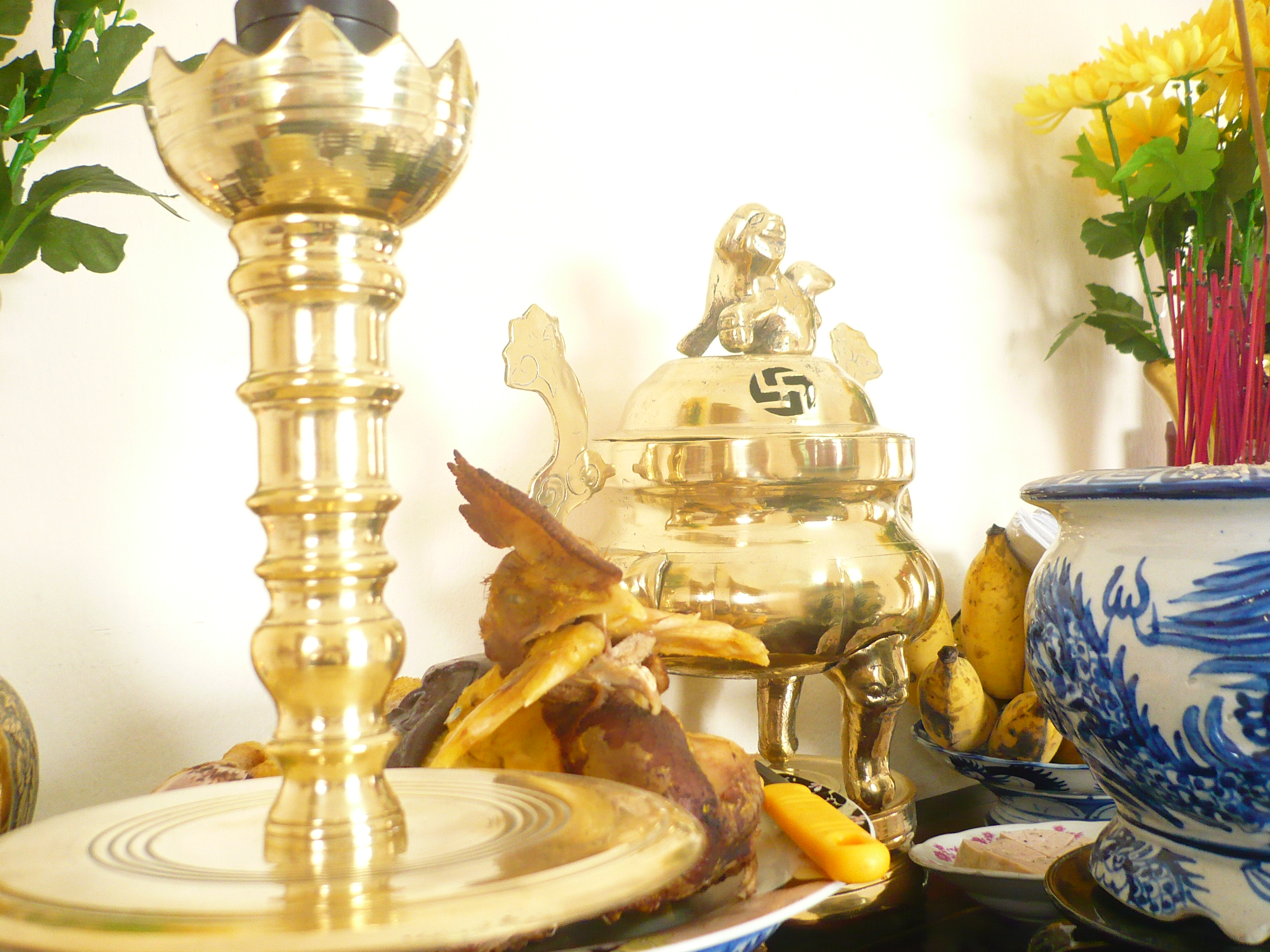 Tự chụp, minh họa cho bài viết